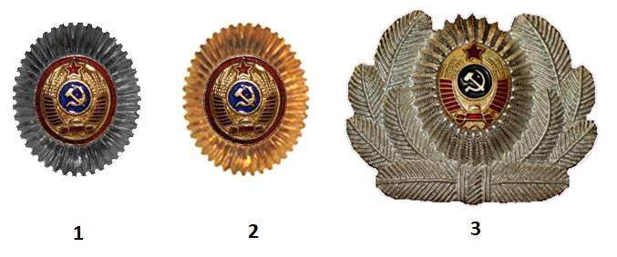 Кокарды 1965